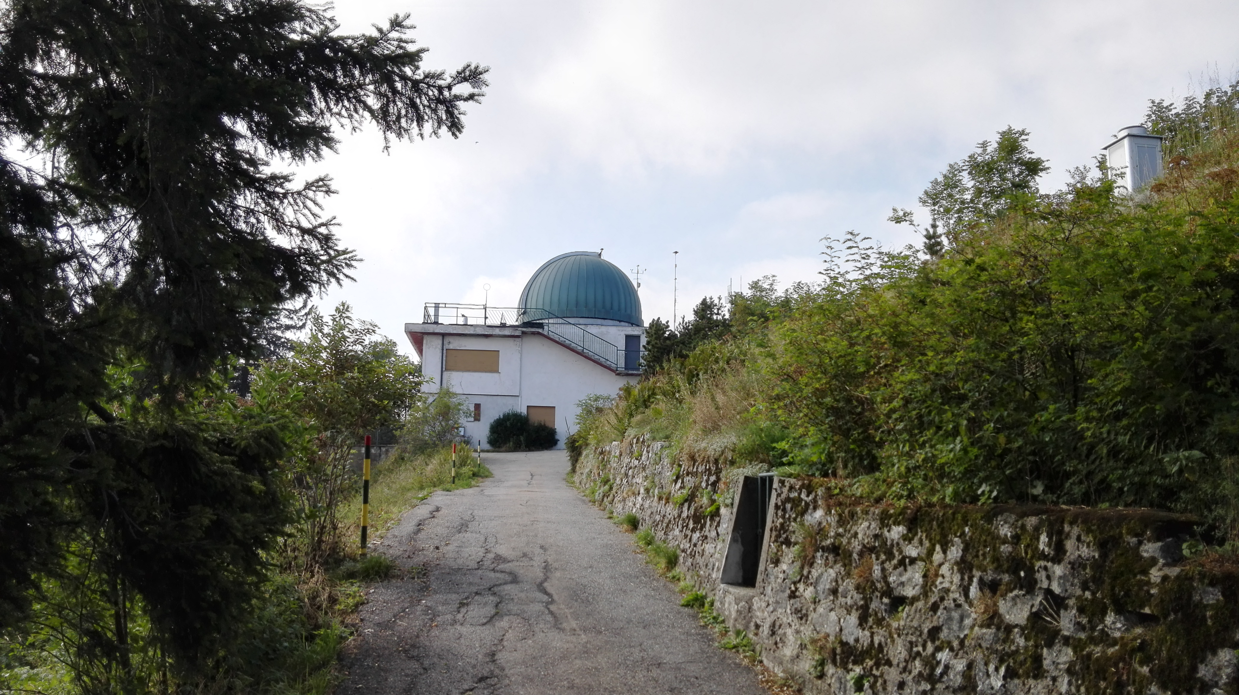 Osservatorio astronomico G.V. Schiaparelli